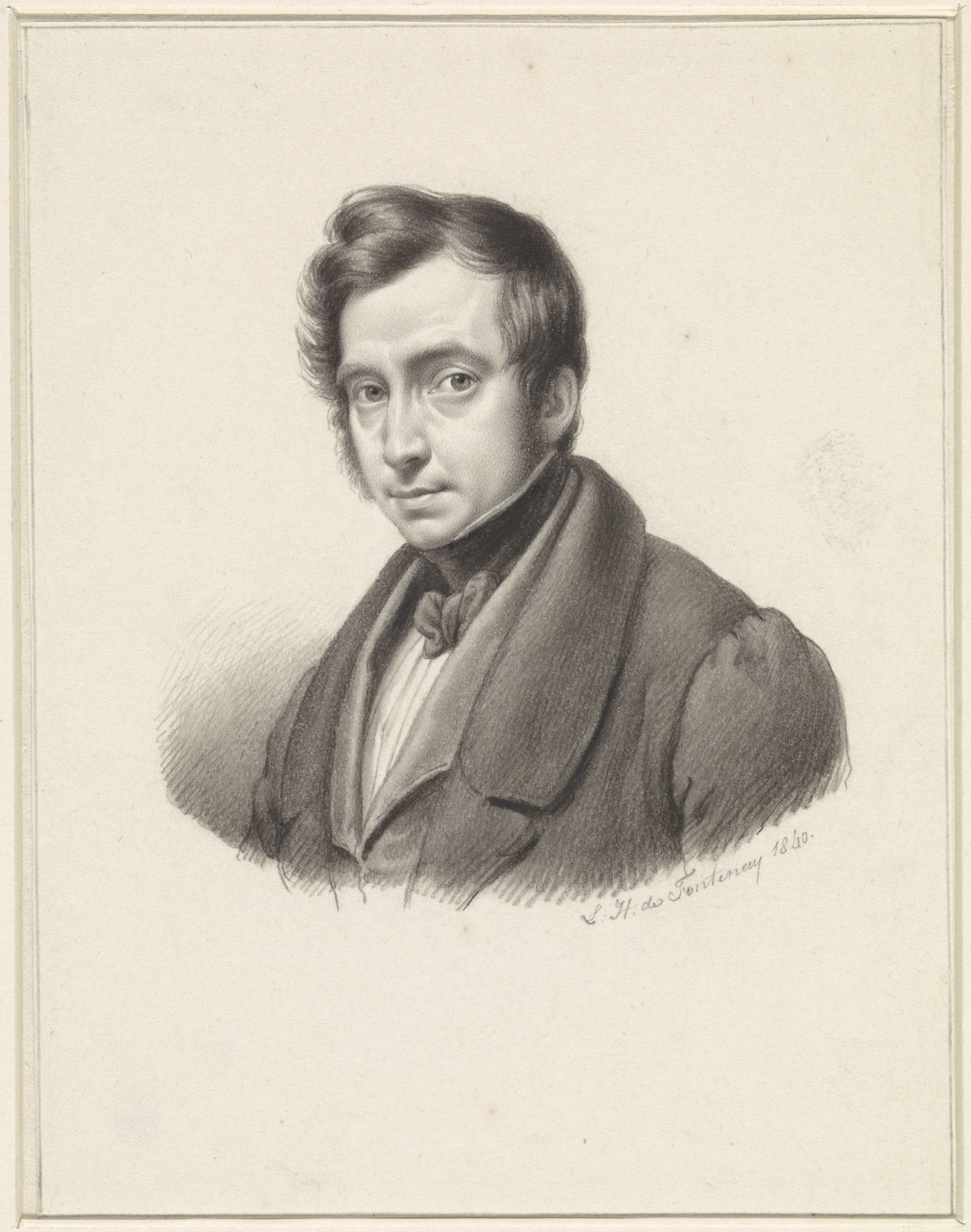 Zelfportret van Louis Henri de Fontenay (1840)